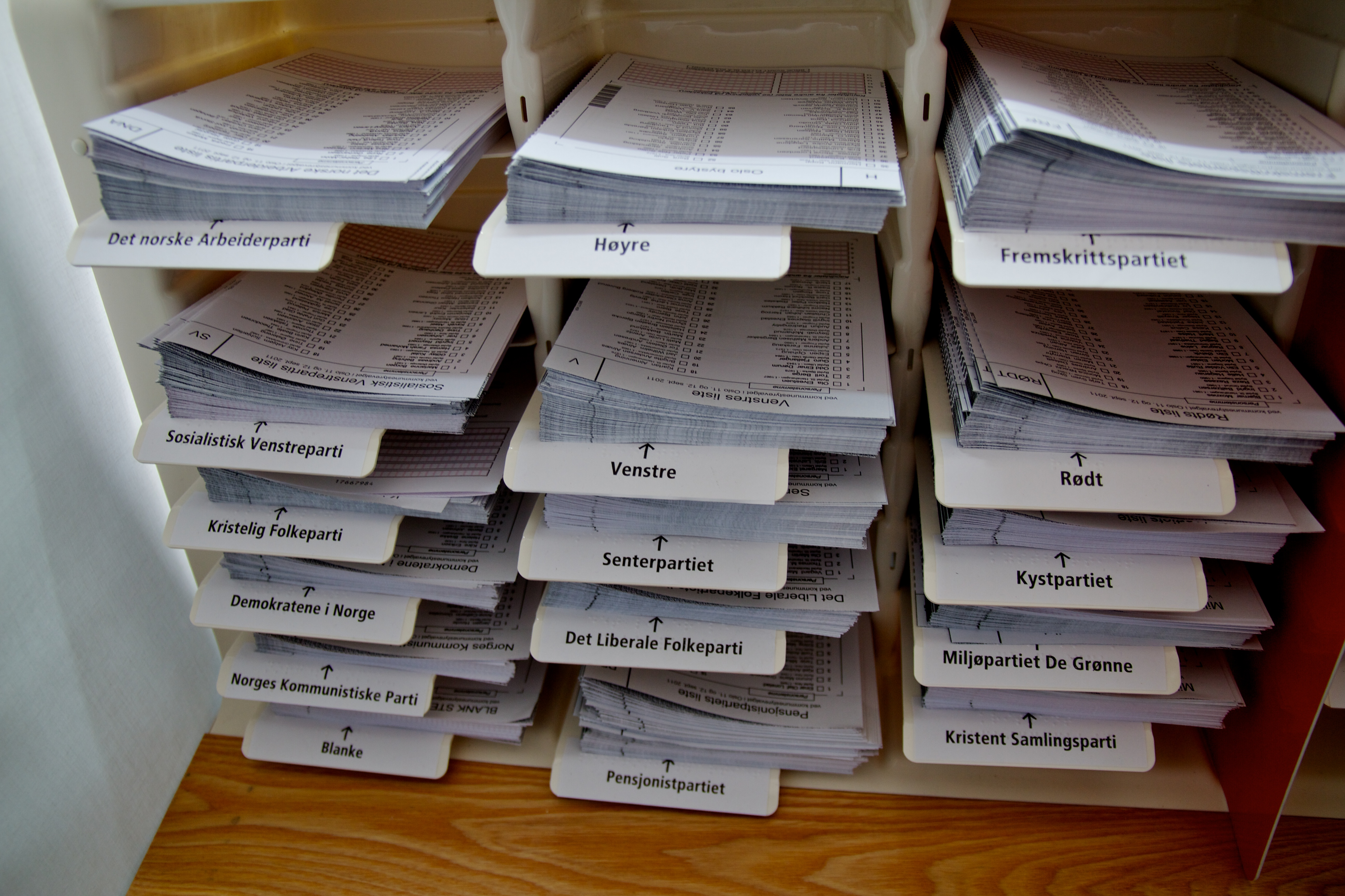 Stemmesedler i et valgavlukke. Kommune- og fylkestingsvalget 2011.